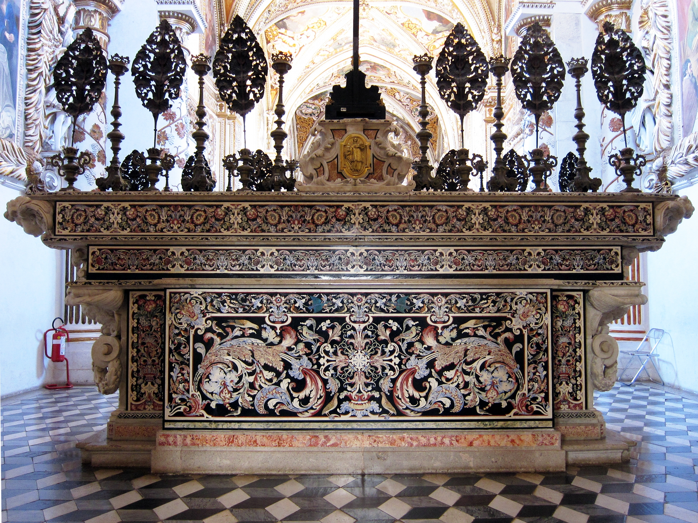 L'autel de l'église de la Certosa di San Lorenzo (Padula).